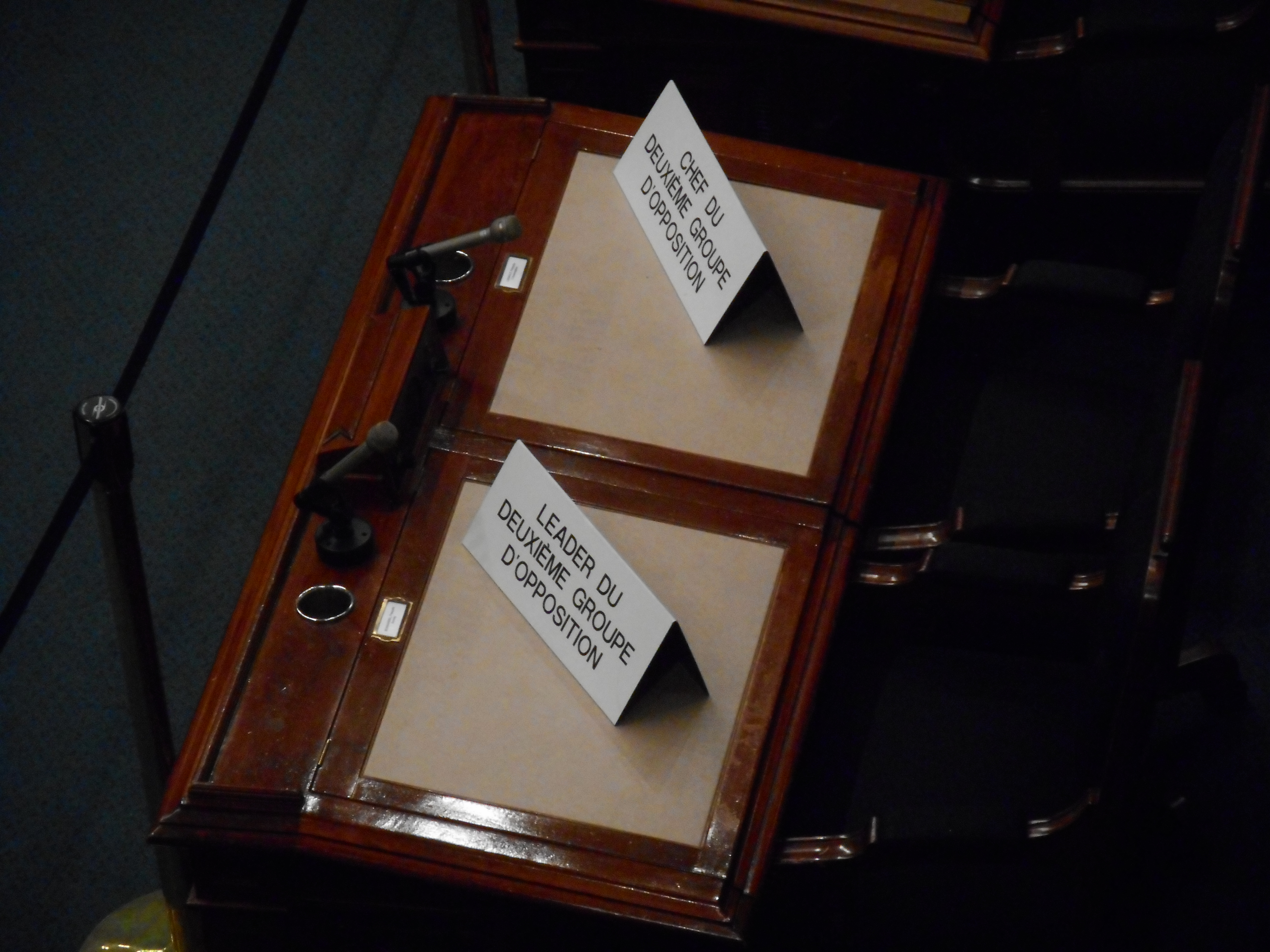 Salon bleu de l'Assemblée nationale du Québec